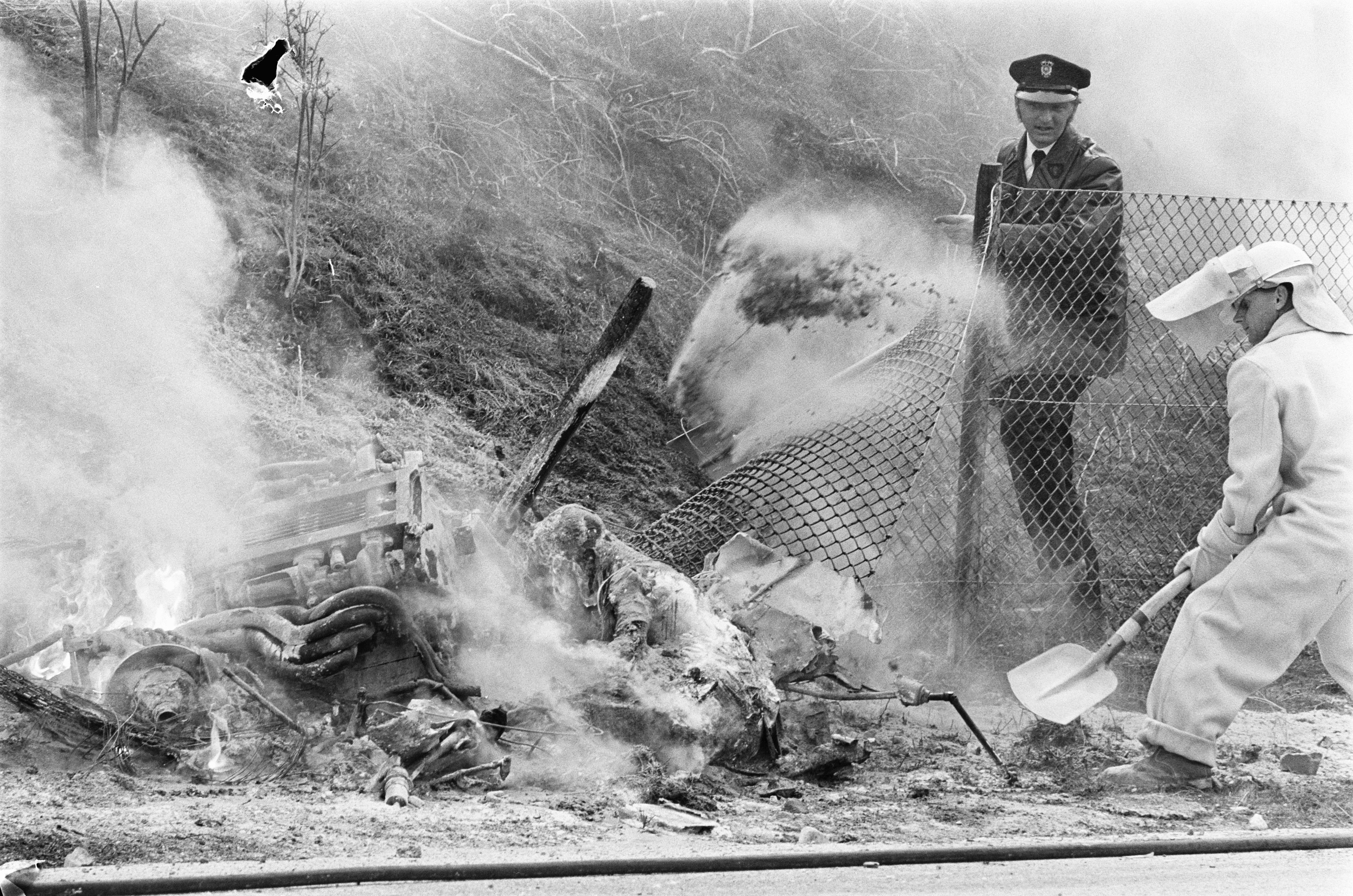 Grand Prix 1970 van Nederland voor Formule I wagens , Zandvoort; wagen in brand.